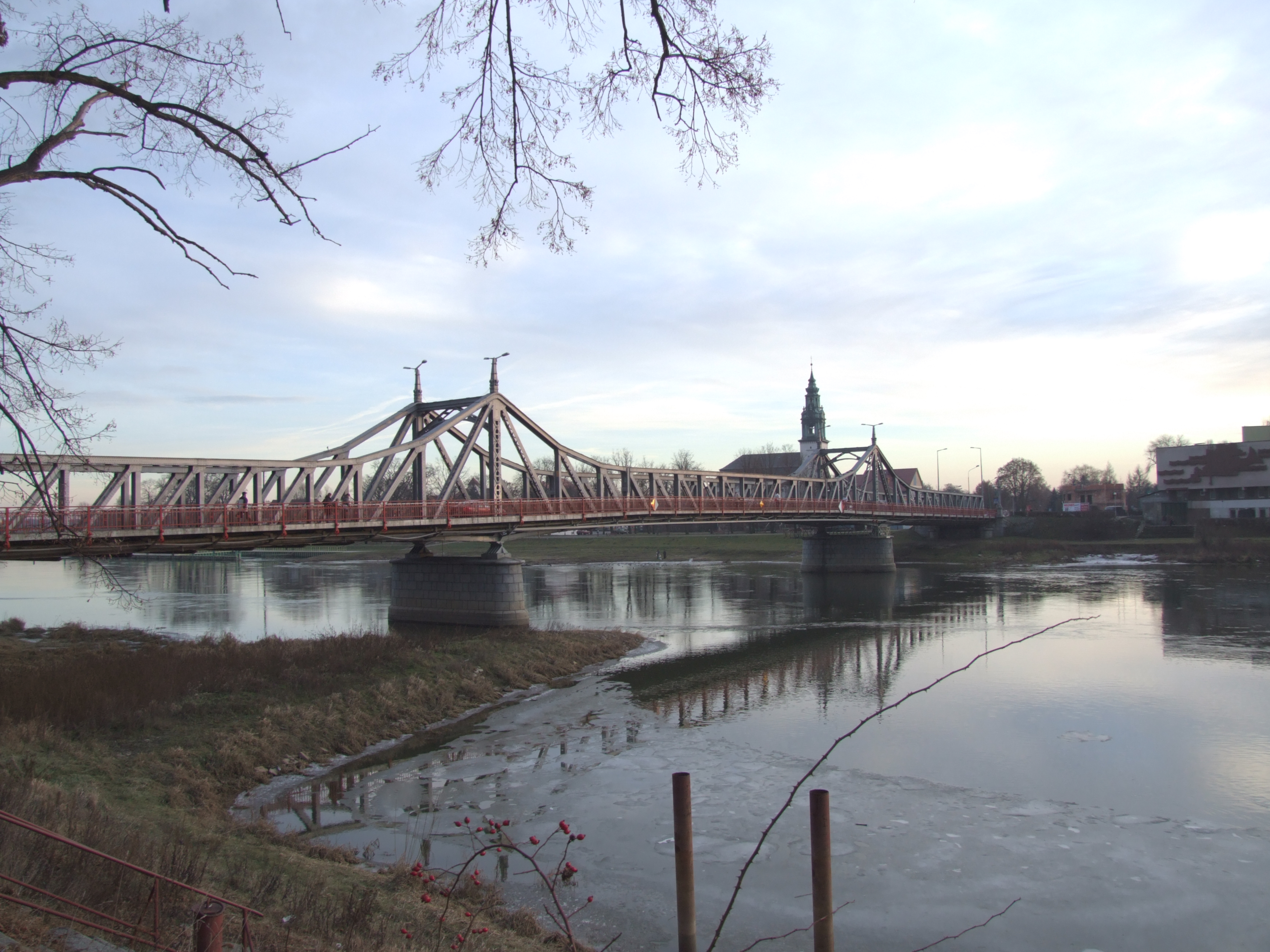 bridge in Krosno Odrzańskie